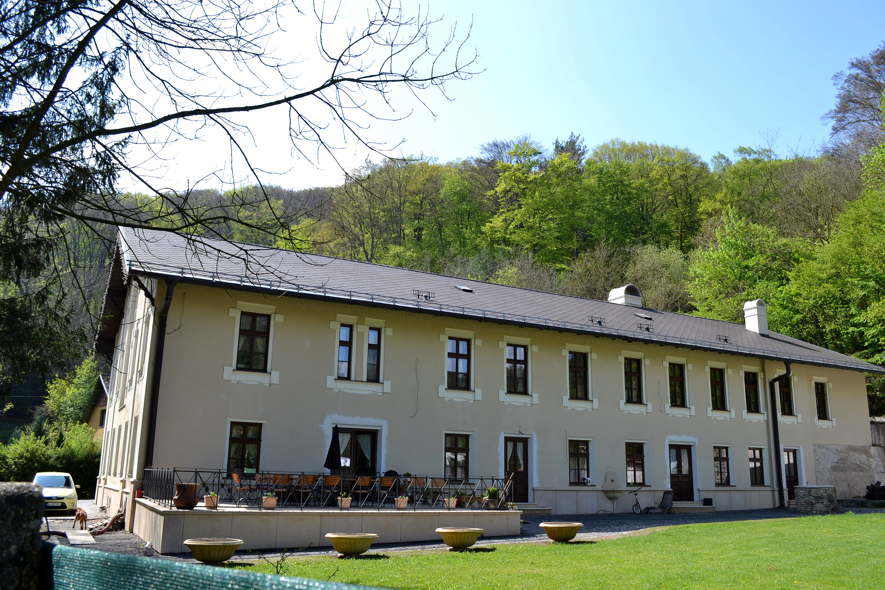 Budova IX. mlyna po rekonštrukcii